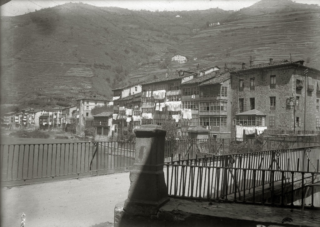 Título original: Vista general de la localidad de Soraluze (1/1) Localización: Placencia de las Armas (Guipúzcoa)